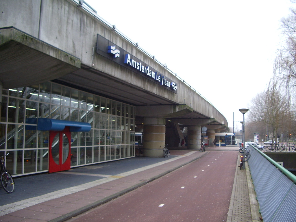 Amsterdam Lelylaan